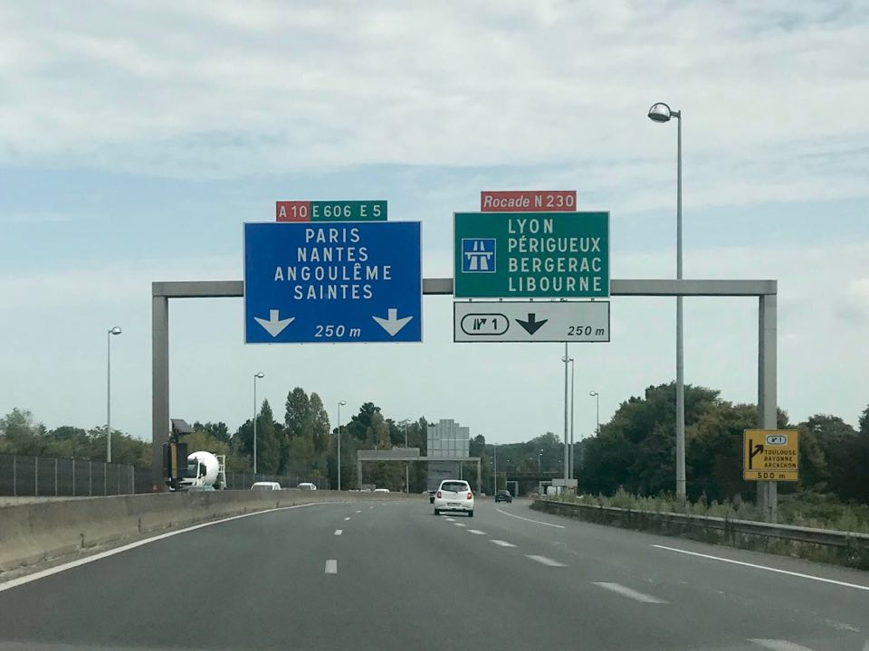 Début de l'A10 sur la Rocade de Bordeaux et bifurcation avec la RN230